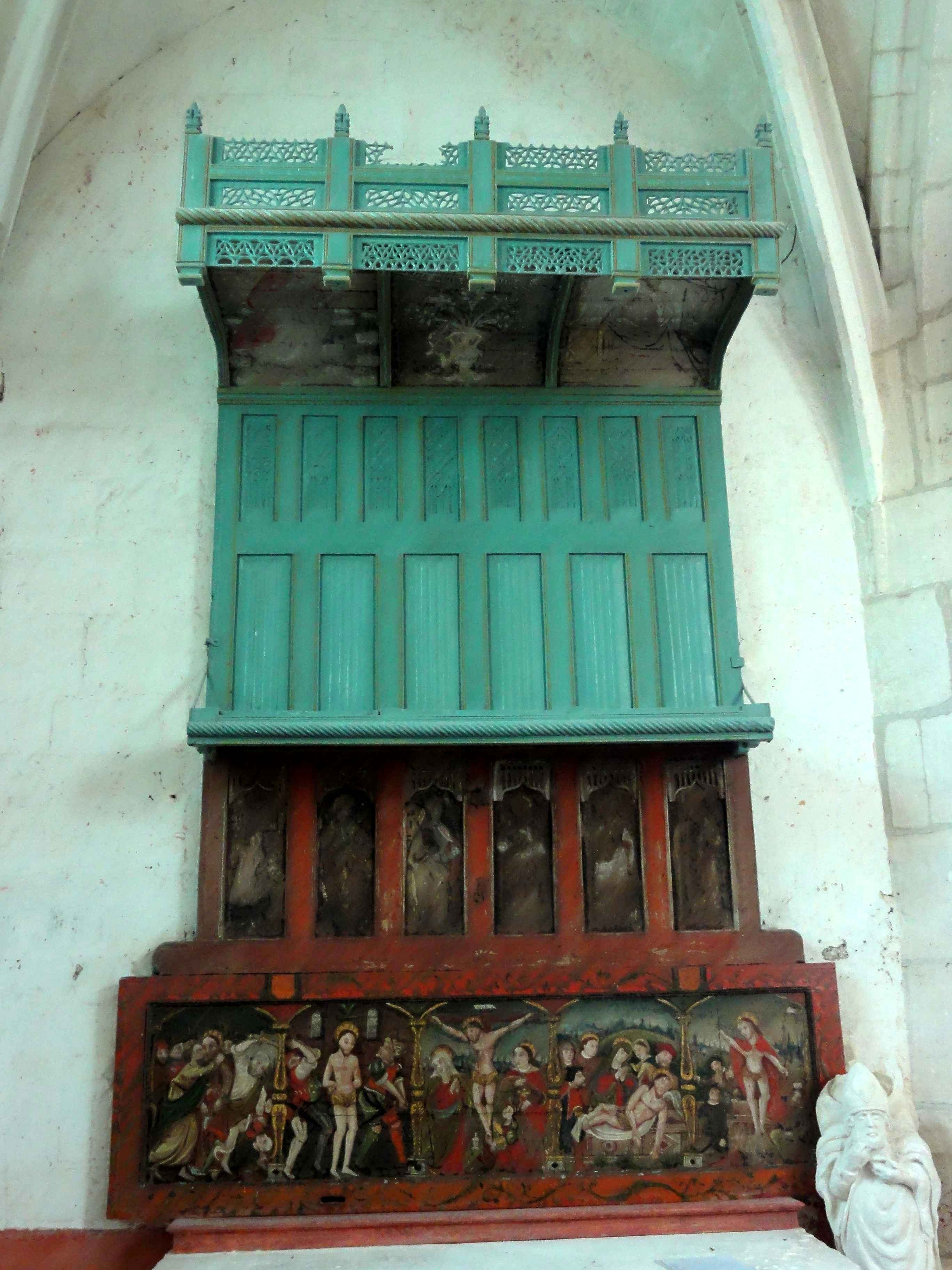 Retable du croisillon nord, vers 1530-1540.